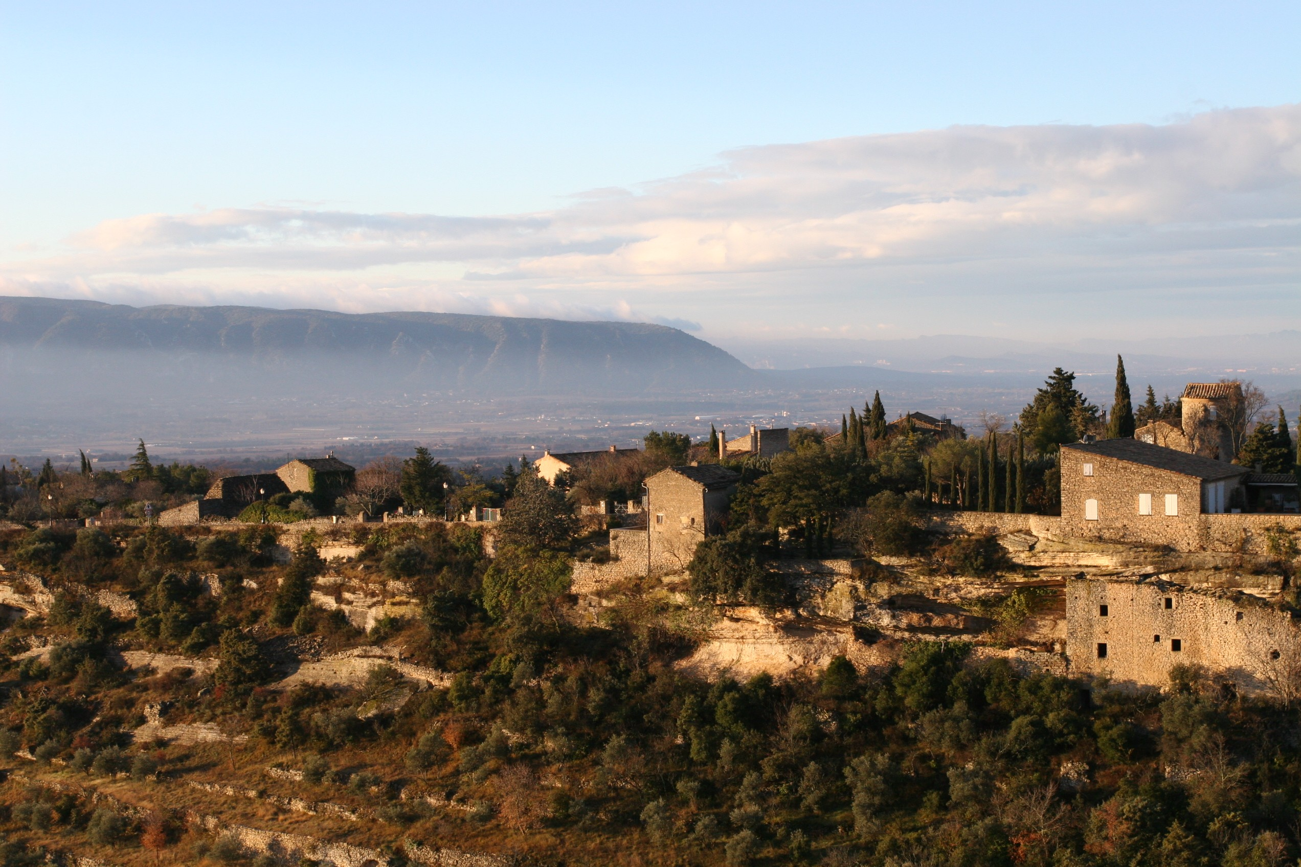 Le "Petit Luberon" vu de Gordes.